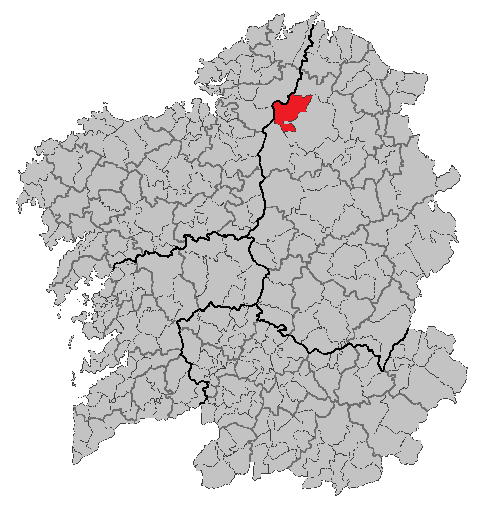 Mapa coa localización do concello de Xermade.